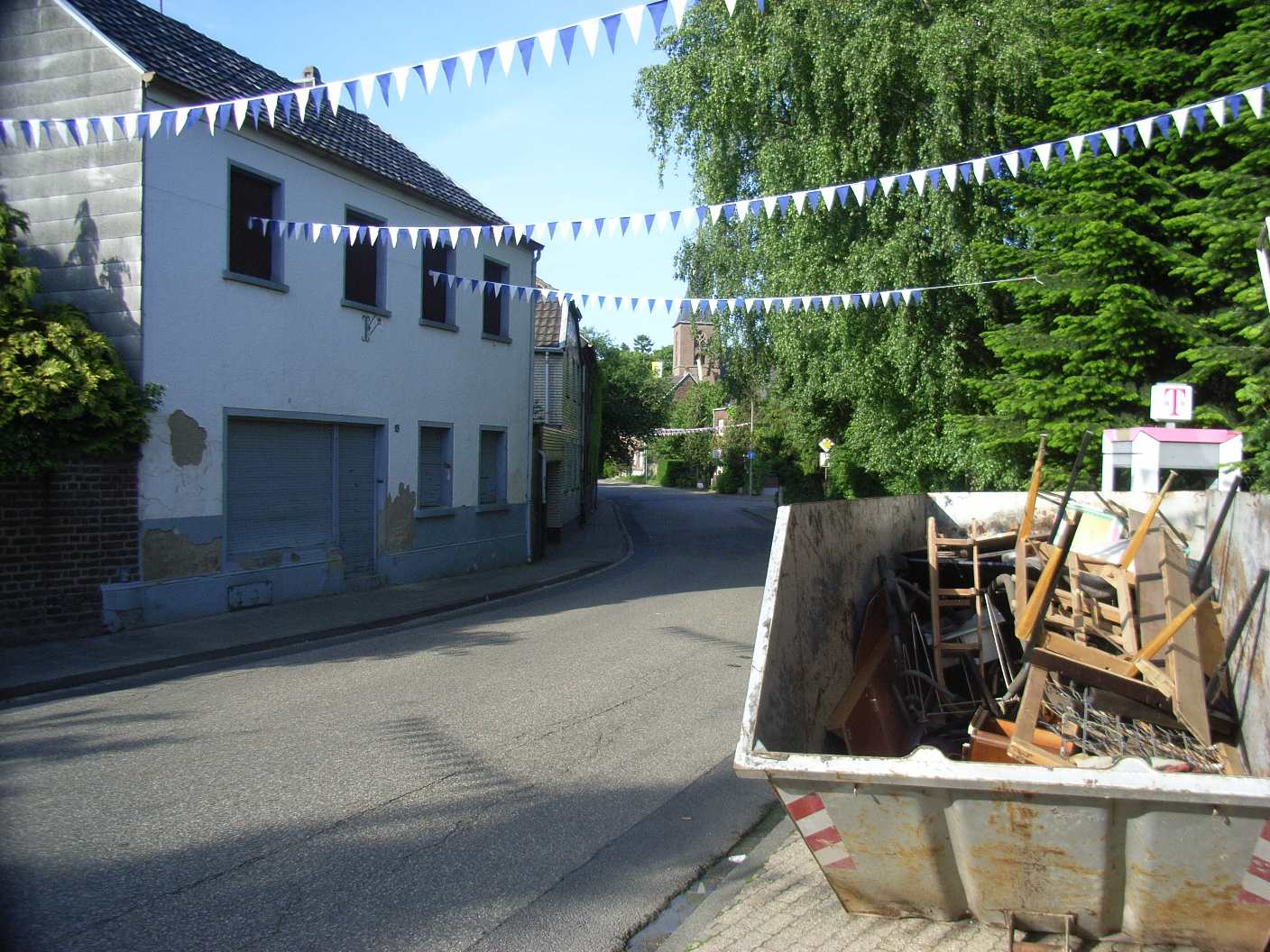 Erkelenz-Borschmich Juni 2010, Hauptstraße mit leerstehenden Häusern, Container, Fahnenschmuck vom letzten Schützenfest im Dorf, Kirche St. Maternus, Umsiedlung im Tagebaugebiet Garzweiler, NRW